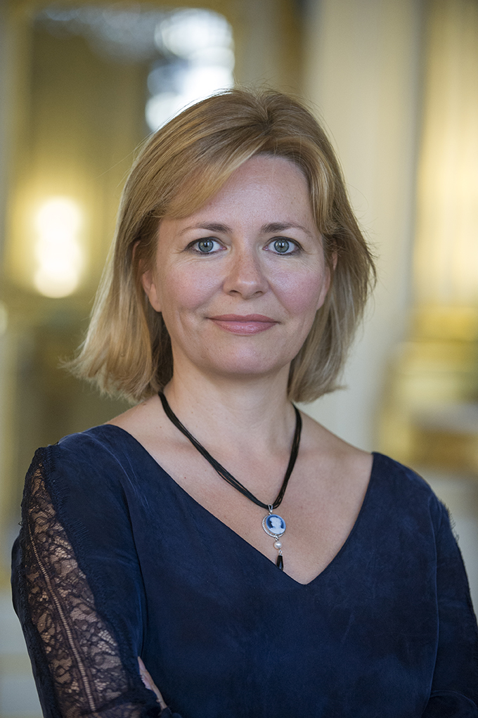 Émilie Cariou, conseillère chargée des affaires européennes, internationales et du numérique au cabinet d’Audrey Azoulay, ministre de la Culture et de la Communication.